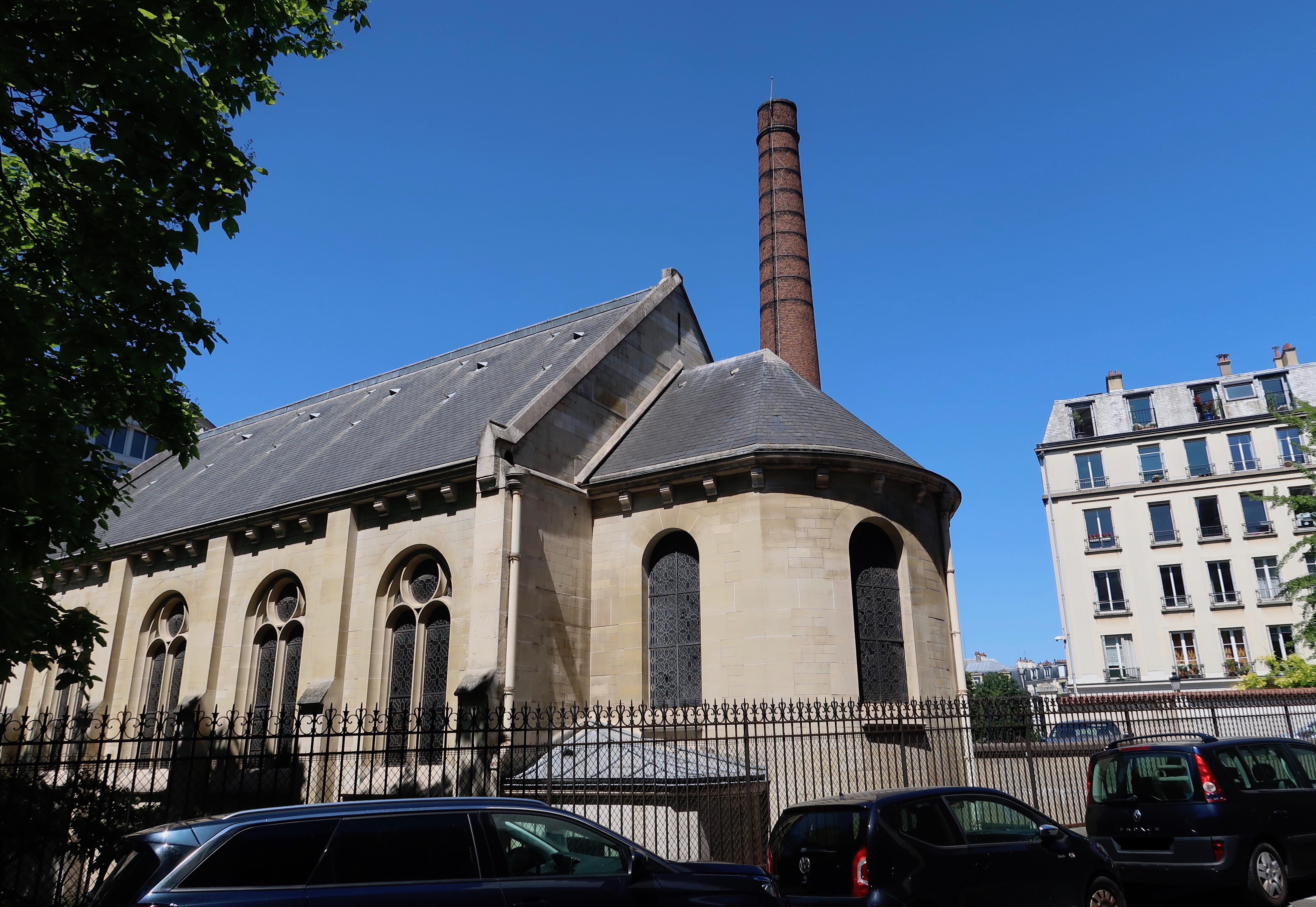 Chapelle du lycée Janson-de-Sailly et cheminée, vues de la rue Decamps (Paris, 16e).